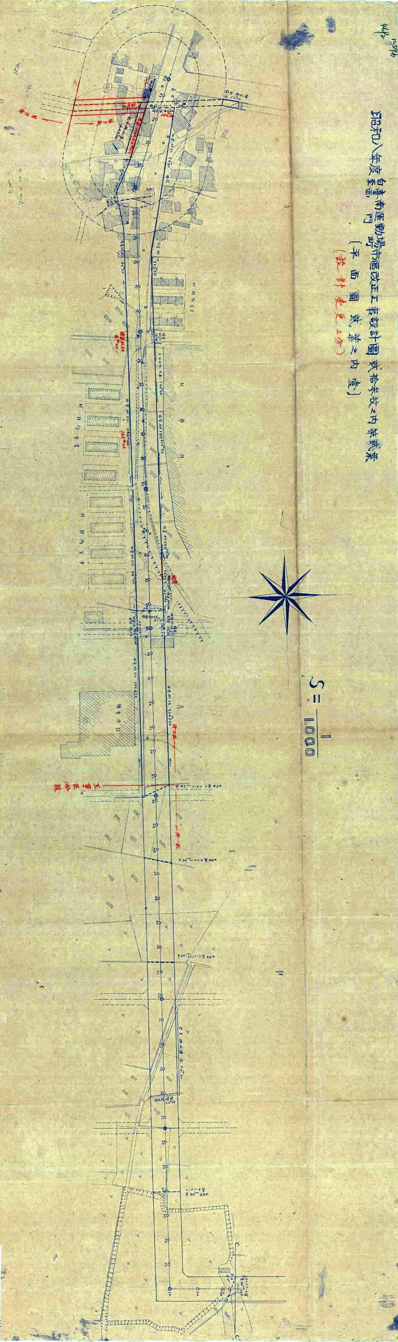 現今小西門以南的西門路開闢計畫圖，圖中可見小西門、刑務所、刑務所官舍、織布會社